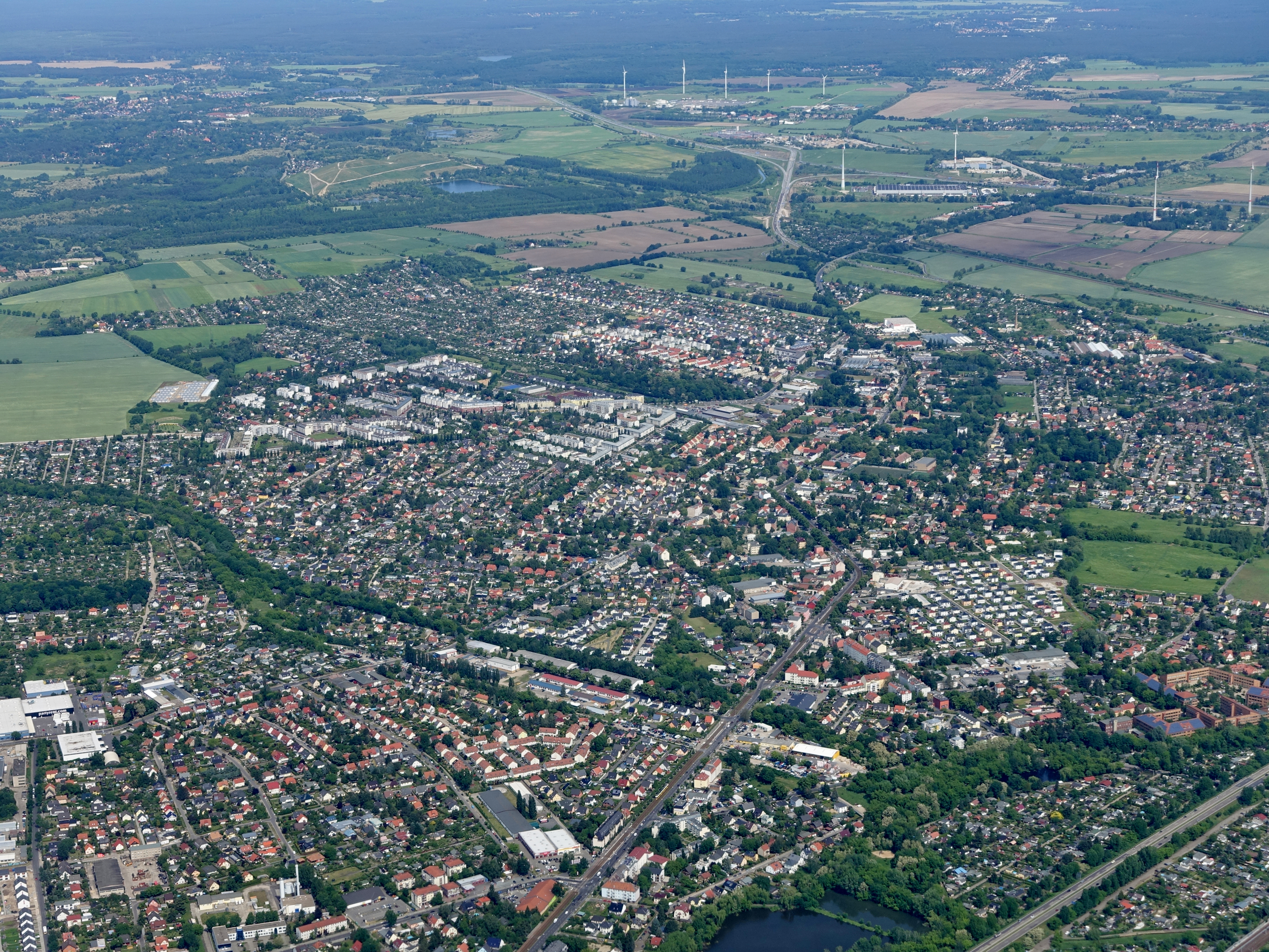 Französisch Buchholz, Berlin, Deutschland